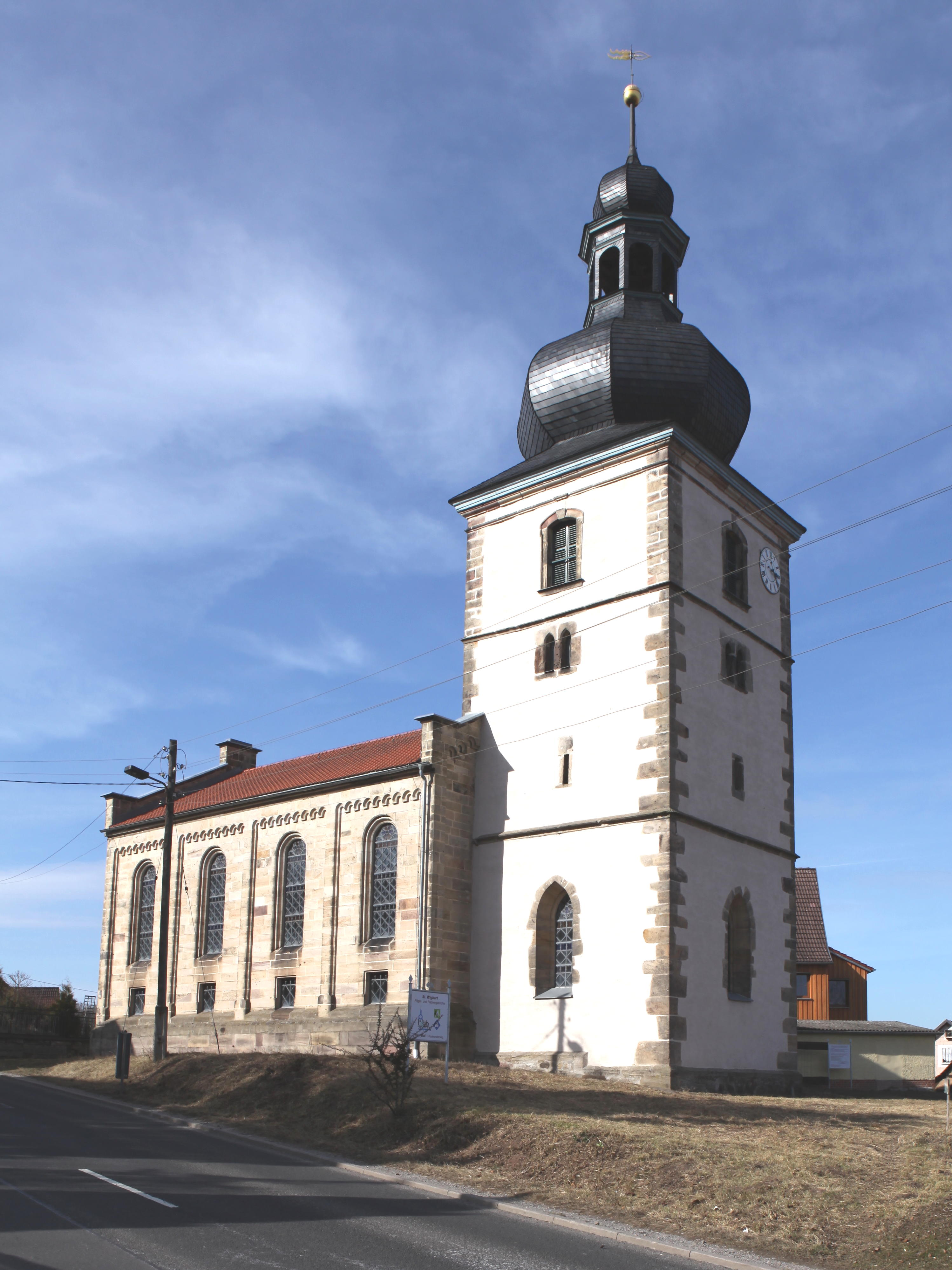 Evangelisch-lutherisch Kirche St. Wigbert in Häselrieth, OT von Hildburghausen